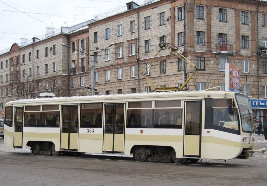 Трамвай в Новокузнецке